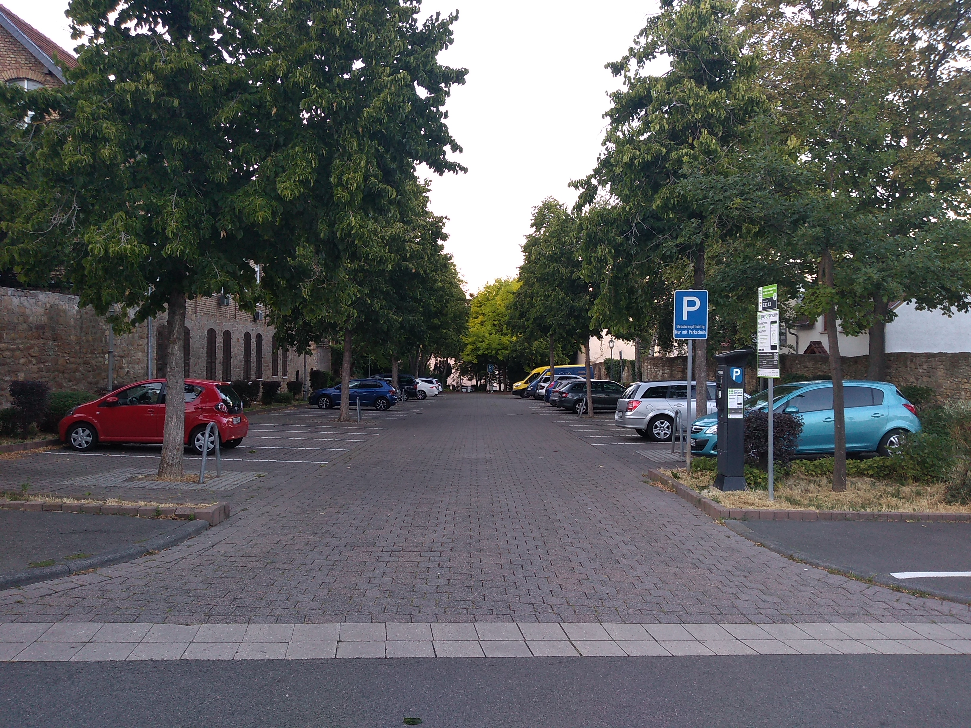 Parkplatz „Am alten Judenfriedhof“ in Alzey, Landkreis Alzey-Worms, Rheinland-Pfalz, Deutschland. Der von vor 1685 bis 1810 genutzte Friedhof wurde 1938 zerstört. Einige Grabsteine des alten Friedhofs finden sich jedoch laut Paul Arnsberg, „Die jüdischen Gemeinden in Hessen, Anfang-Untergang-Neubeginn“ auf dem älteren Teil des heutigen Alzeyer jüdischen Friedhofs (1810-1870) an der Berliner Straße. Die Mauer auf der rechten Seite der Parkplatzes könnte ein Teil der ursprünglichen Friedhofsmauer sein.